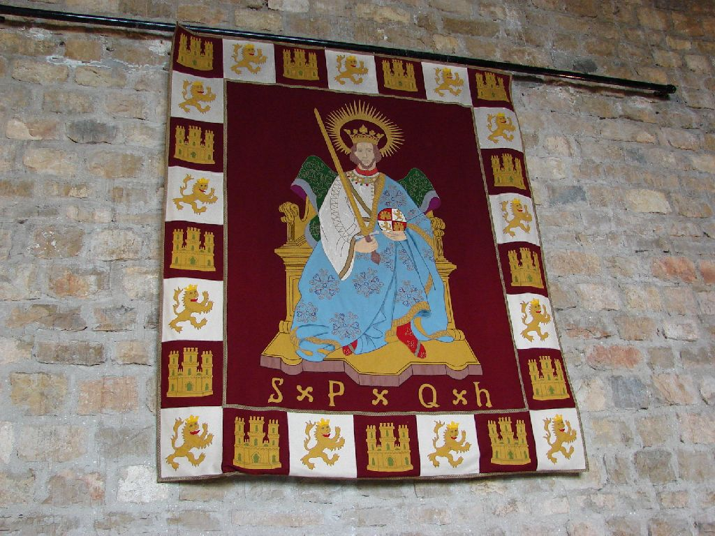 Estandarte con un bordado del Fernando III el Santo.